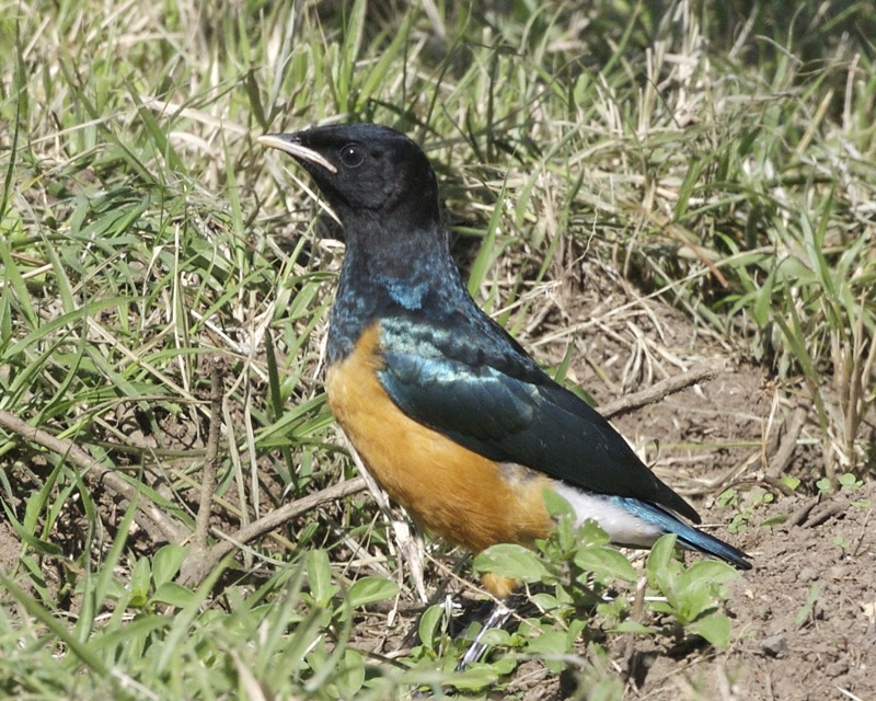 Juvenile Superb Starling (Lamprotornis superbus), Lake Nakuru, Kenya. August 31, 2008